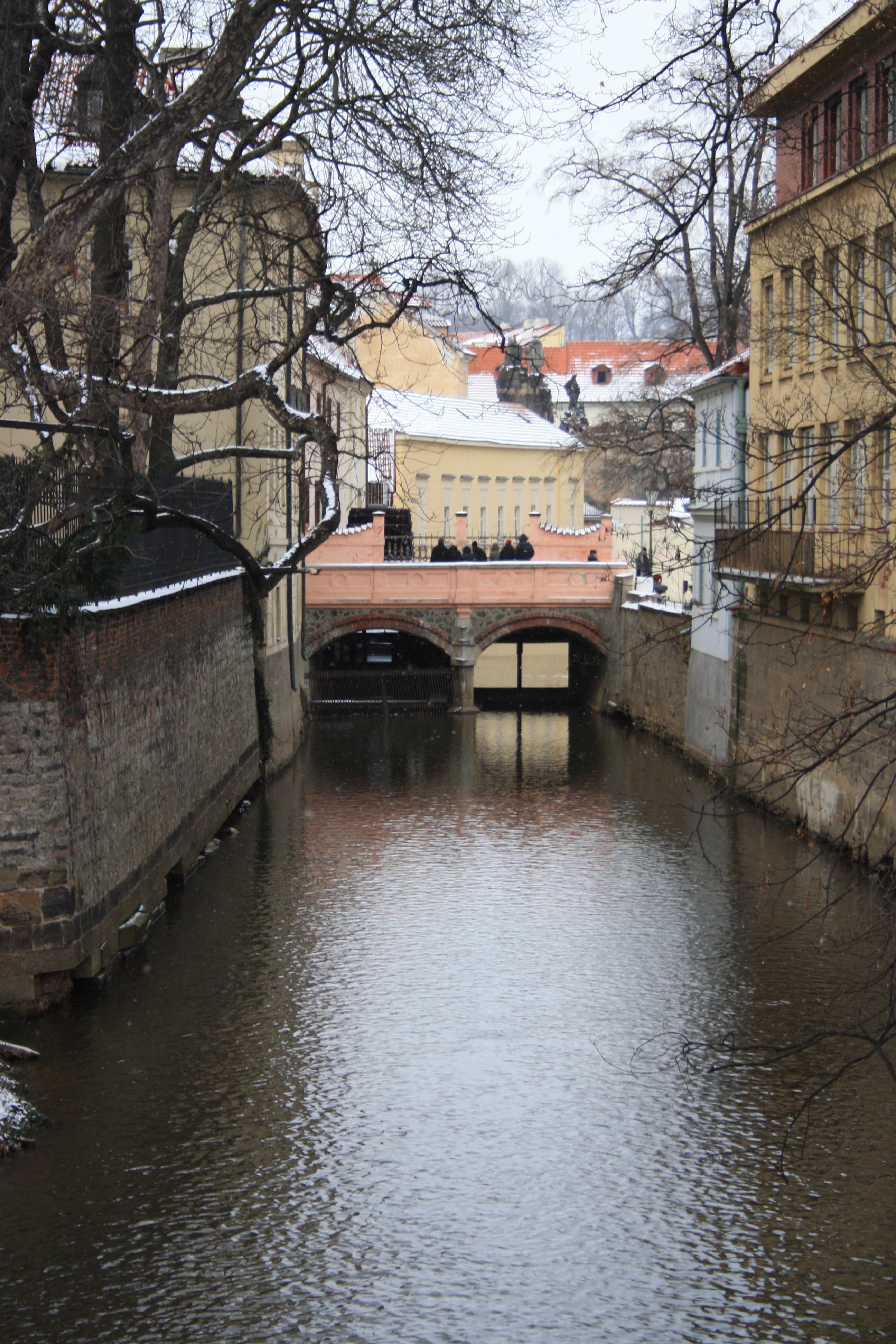 Praha-Malá Strana, náhon Čertovka, můstek u Velkopřevorského mlýna.